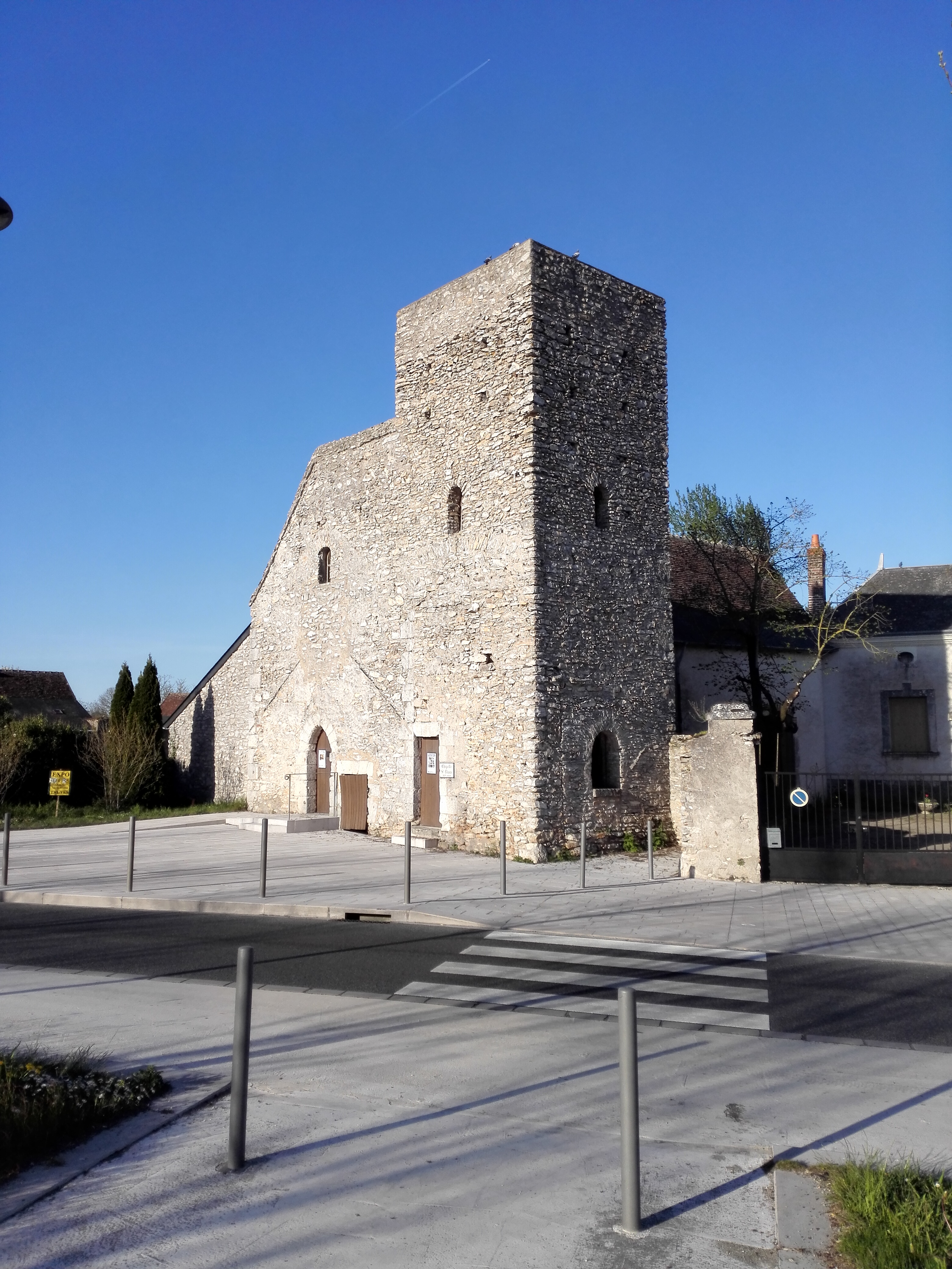 Chapelle Saint-Blaise, Truyes .